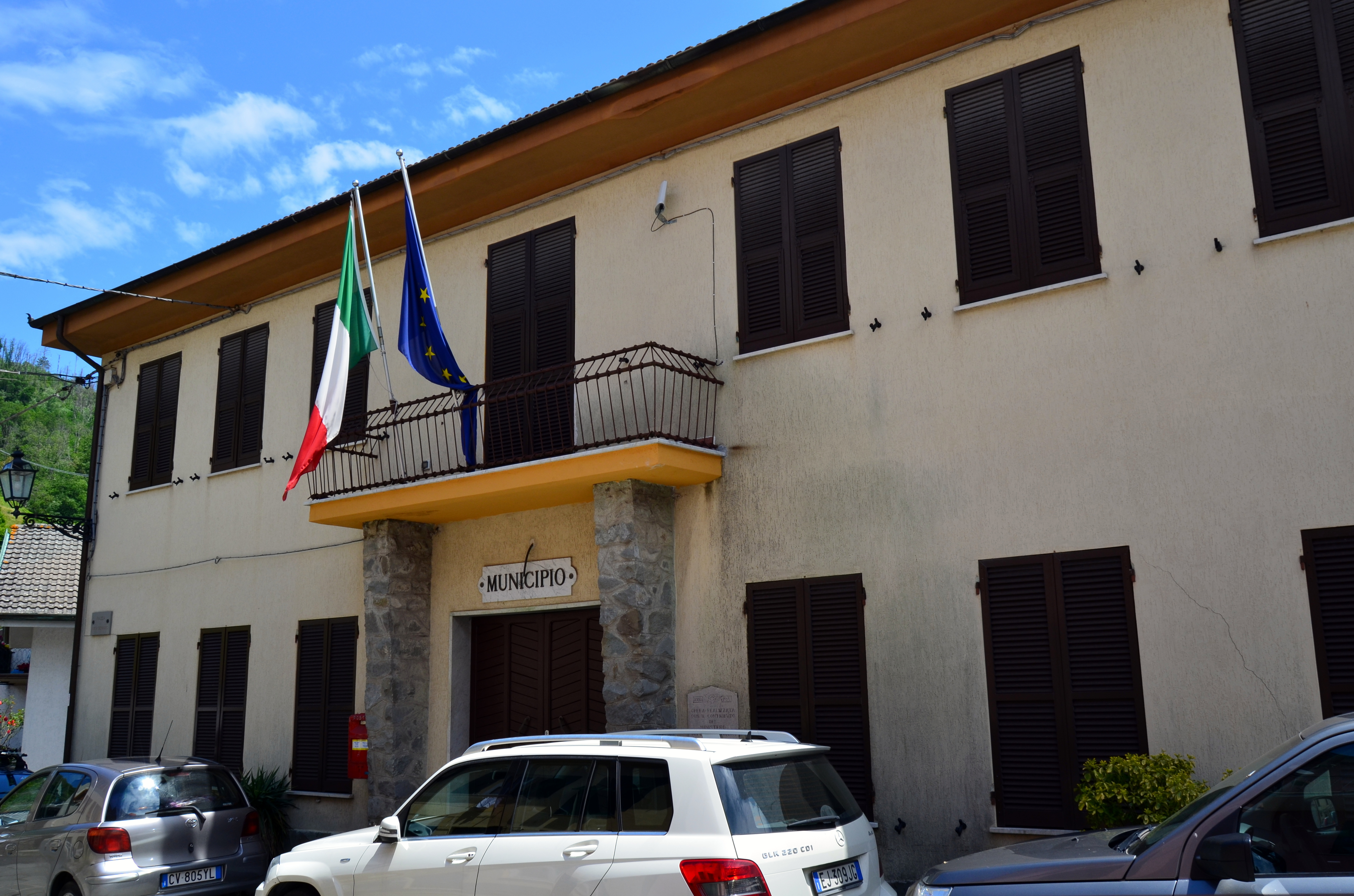 Municipio, Carrodano Inferiore, Carrodano, Liguria, Italia